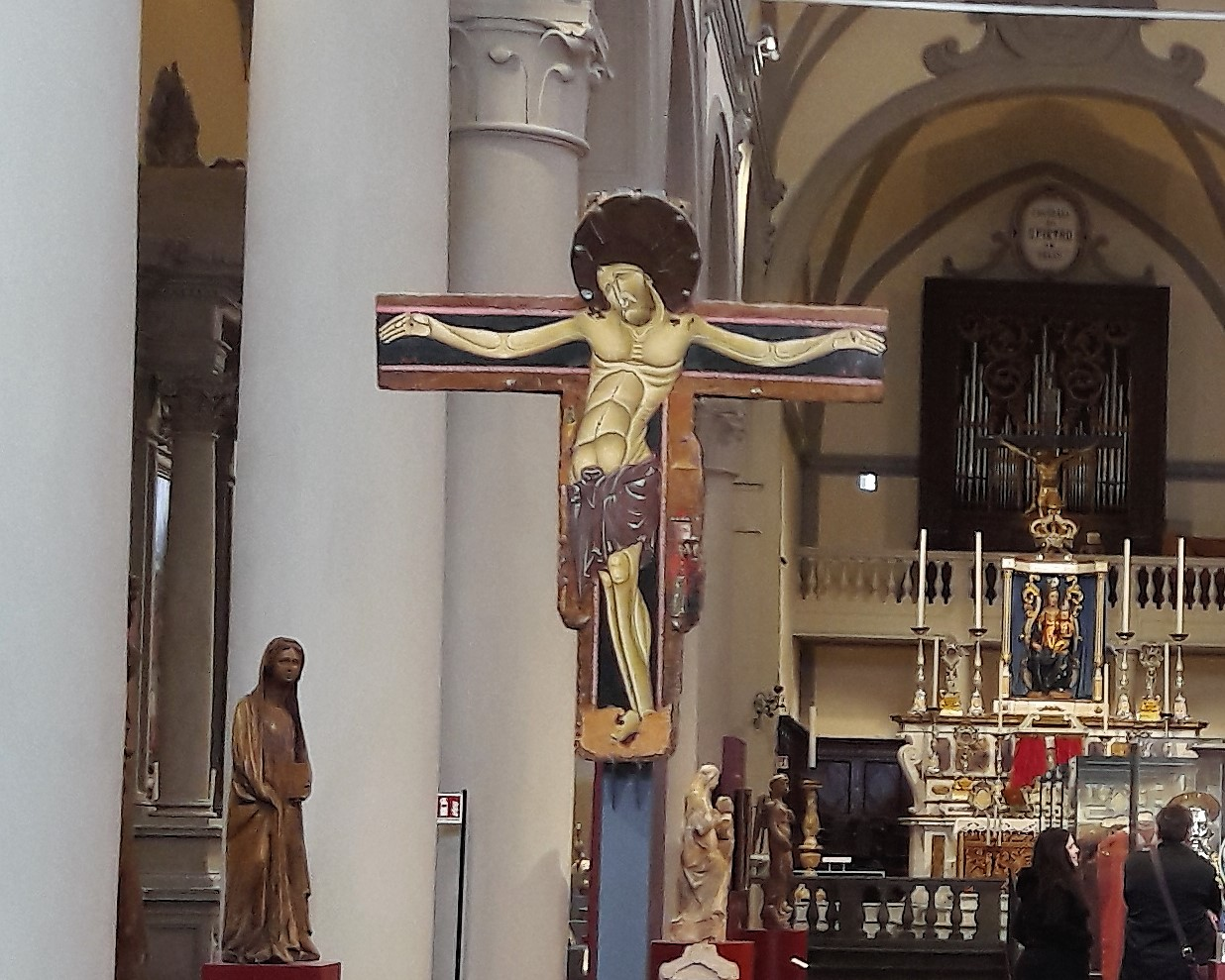 Croce dipinta del XIII secolo attribuita al Maestro di Castelfiorentino